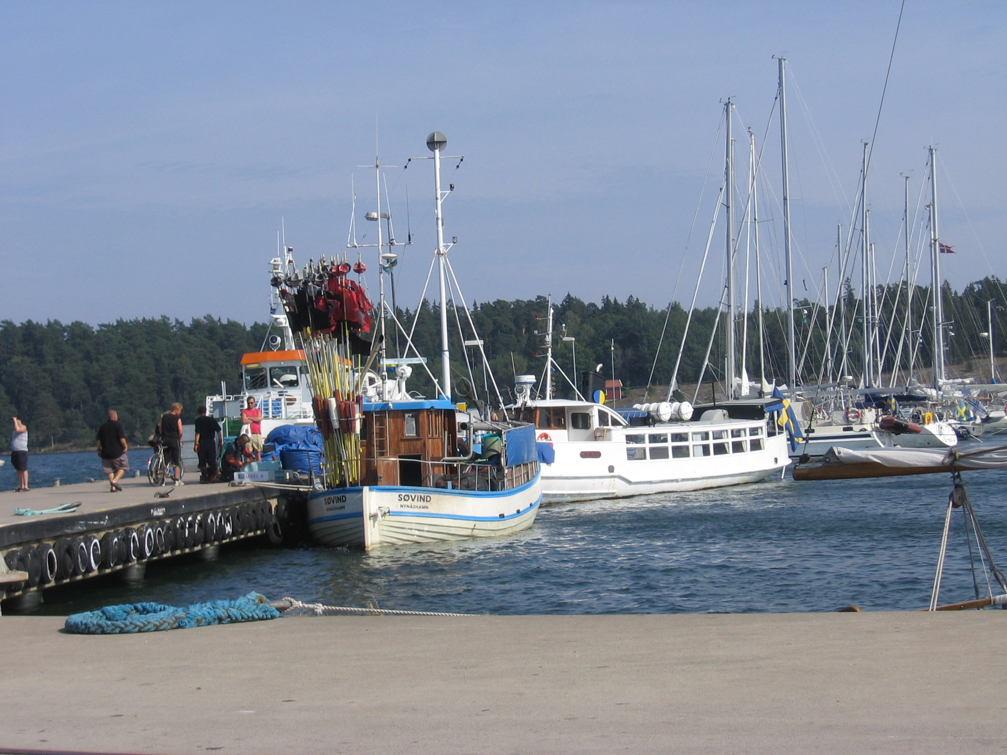 zelfgemaakte foto uit 2006